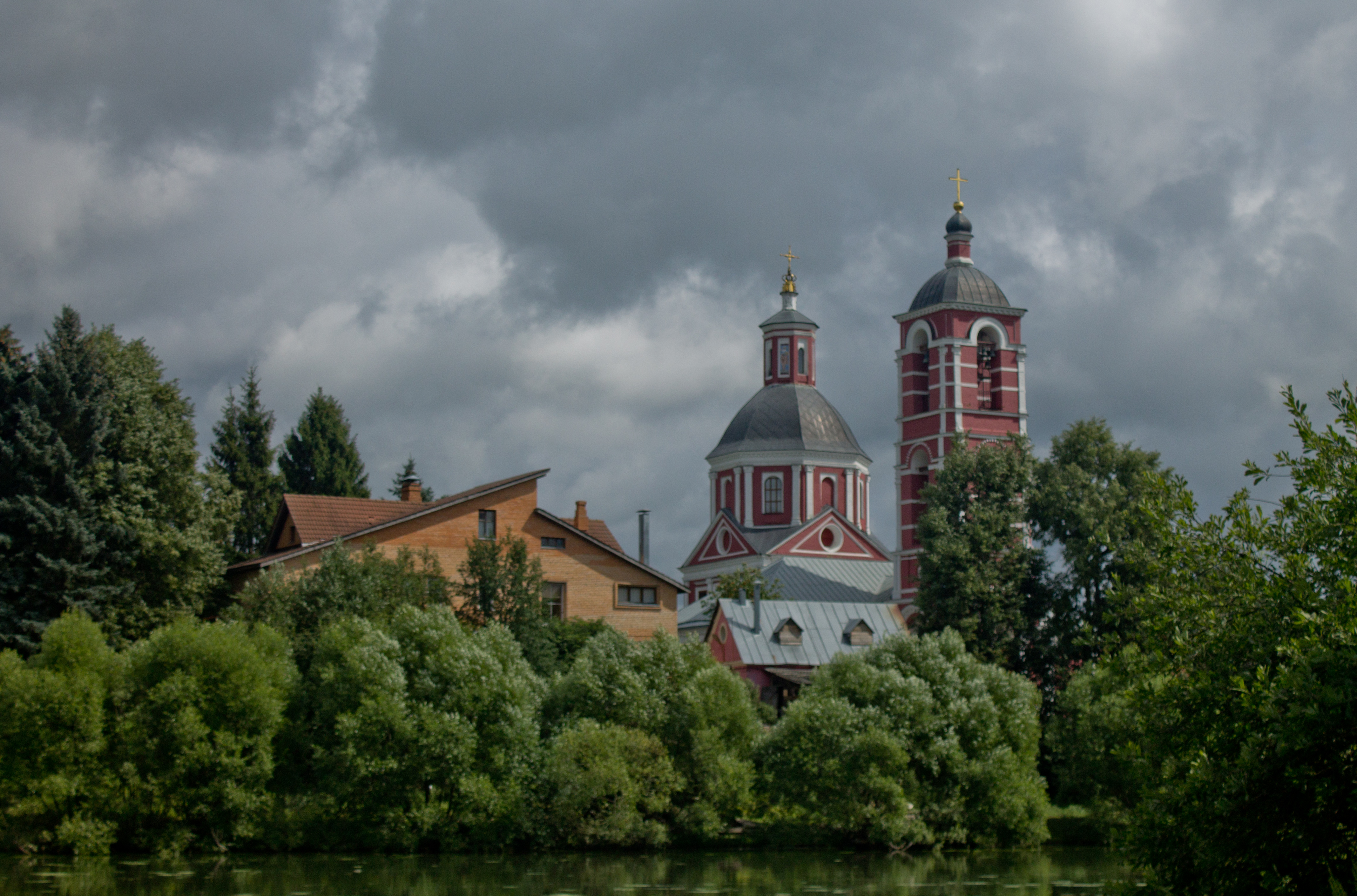 Церковь Покрова Пресвятой Богородицы: (Покровское, Покровская община), Юдановка, Троицкий округ, Москва